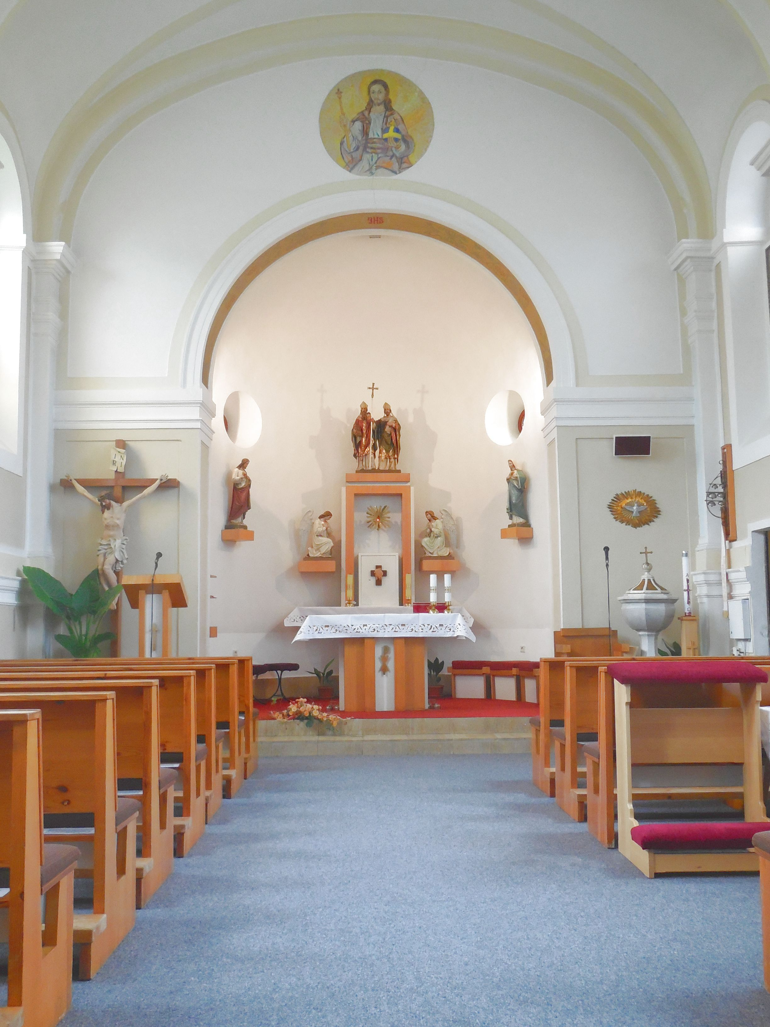 Kostel sv. Cyrila a Metoděje - Babice u Uherského Hradiště